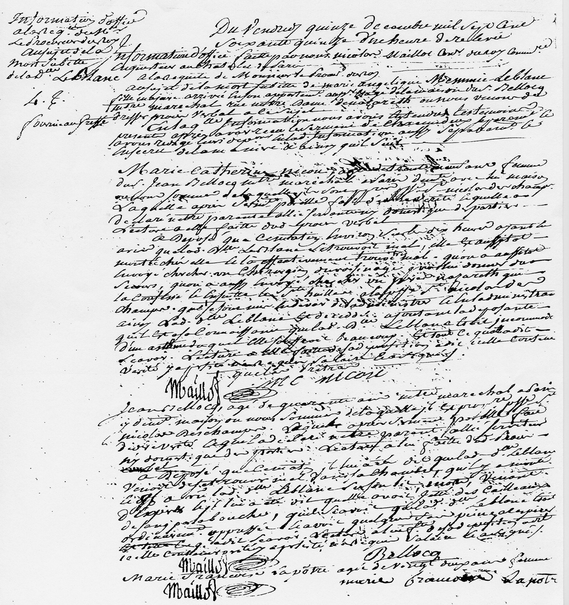 Première page du procès verbal de son décès : Archives nationales, série Y, carton 14470, 15 décembre 1775.